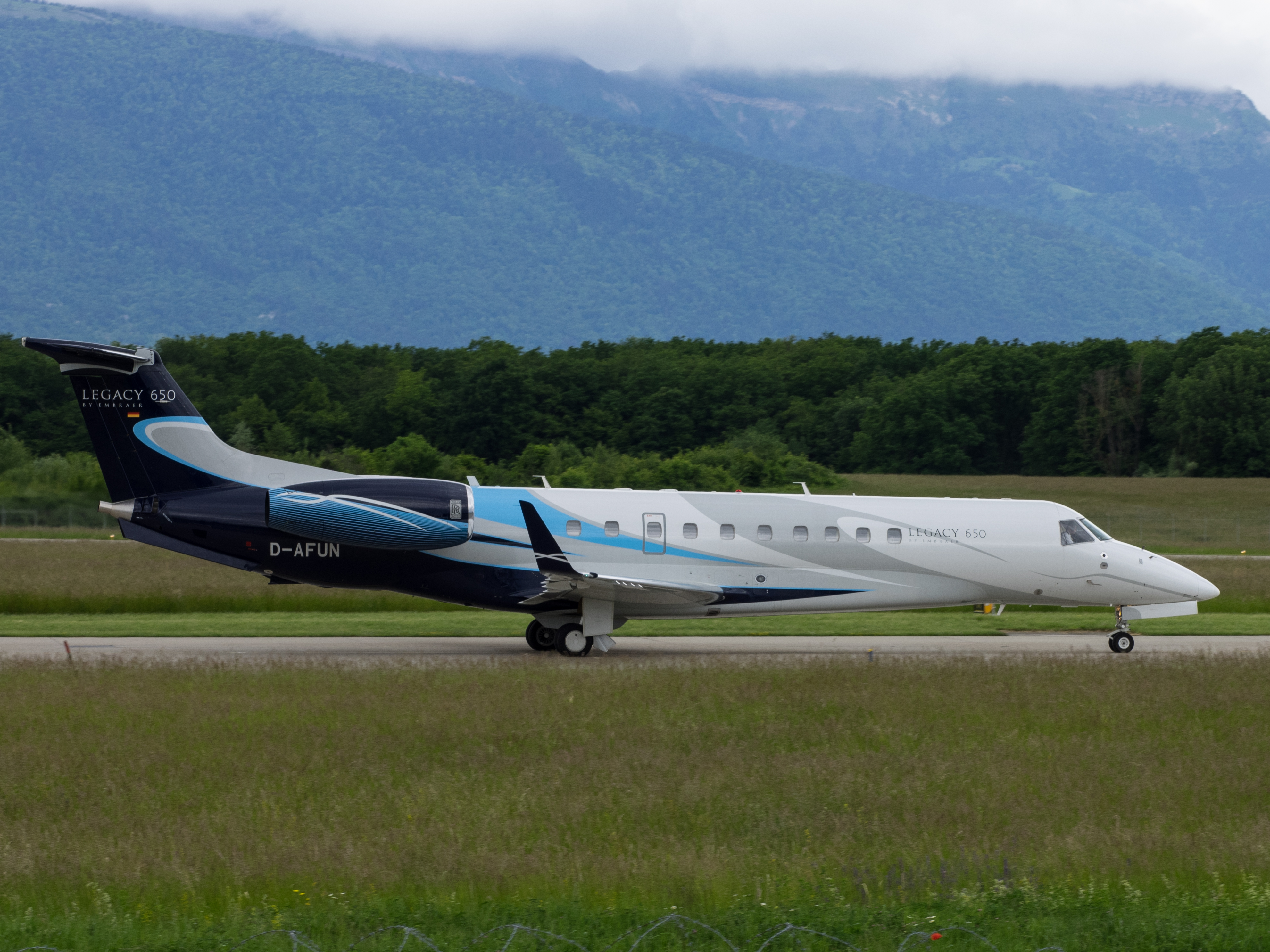 GVA 20.05.2015